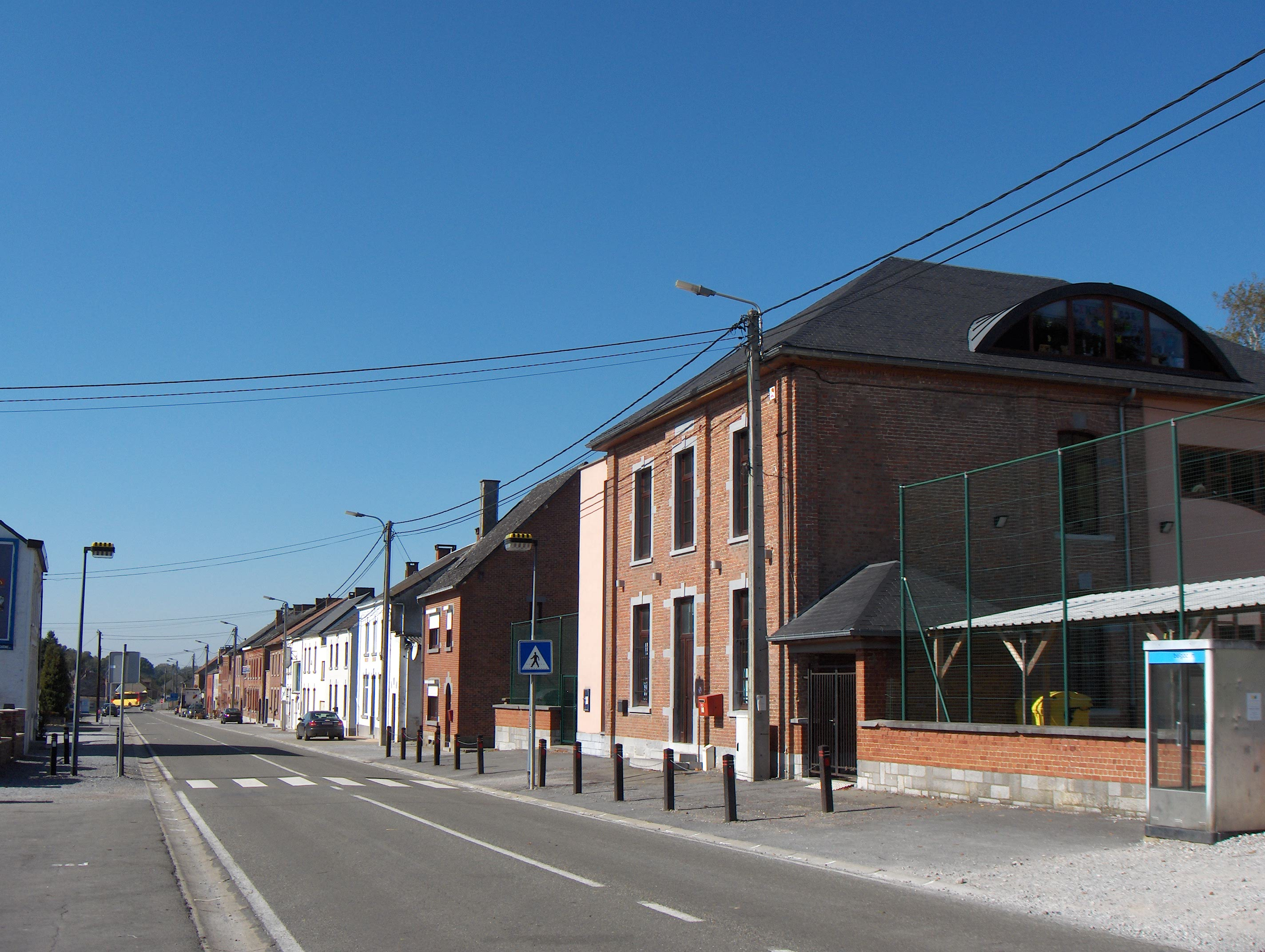 Pontaury, Ortsteil der Gemeinde Mettet (Belgien, Provinz Namur), rue de Pontaury.